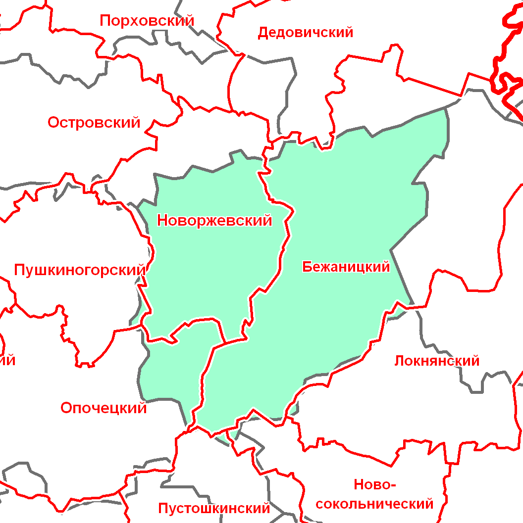 Новоржевский уезд Псковской губернии в современной сетке районов